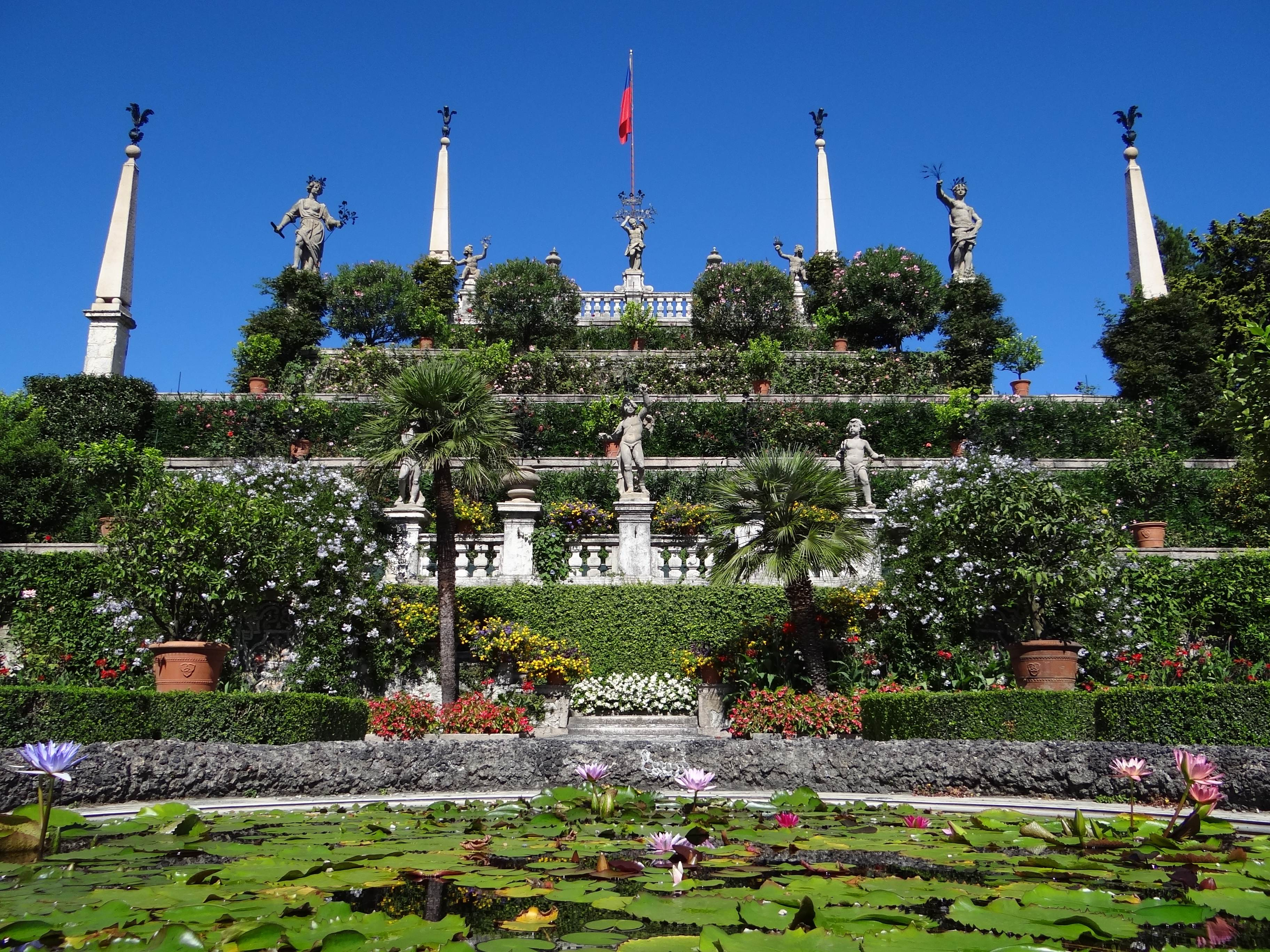 Isola Bella - Terrasse